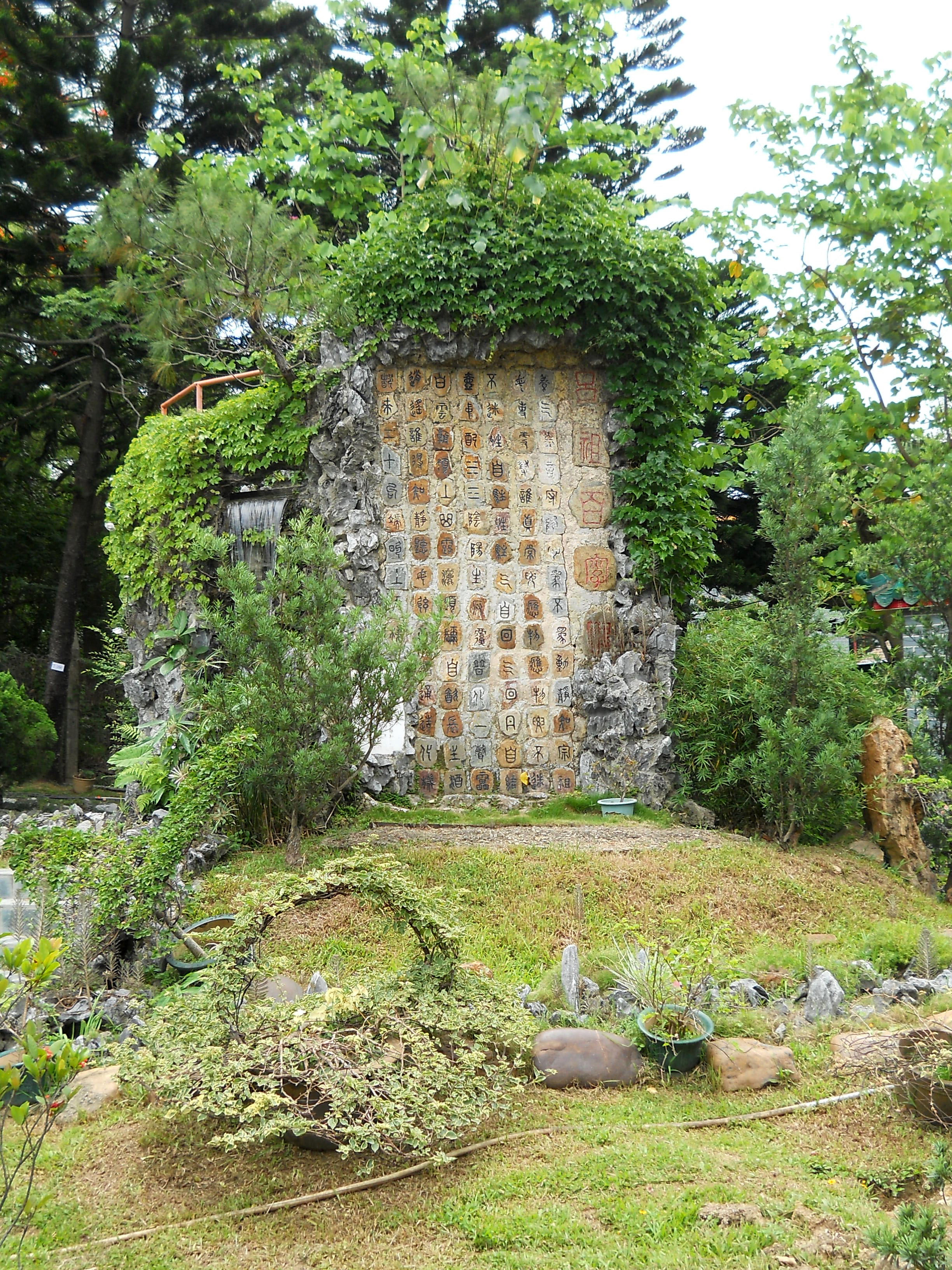 中文（香港）: 雲泉仙館呂祖百字碑